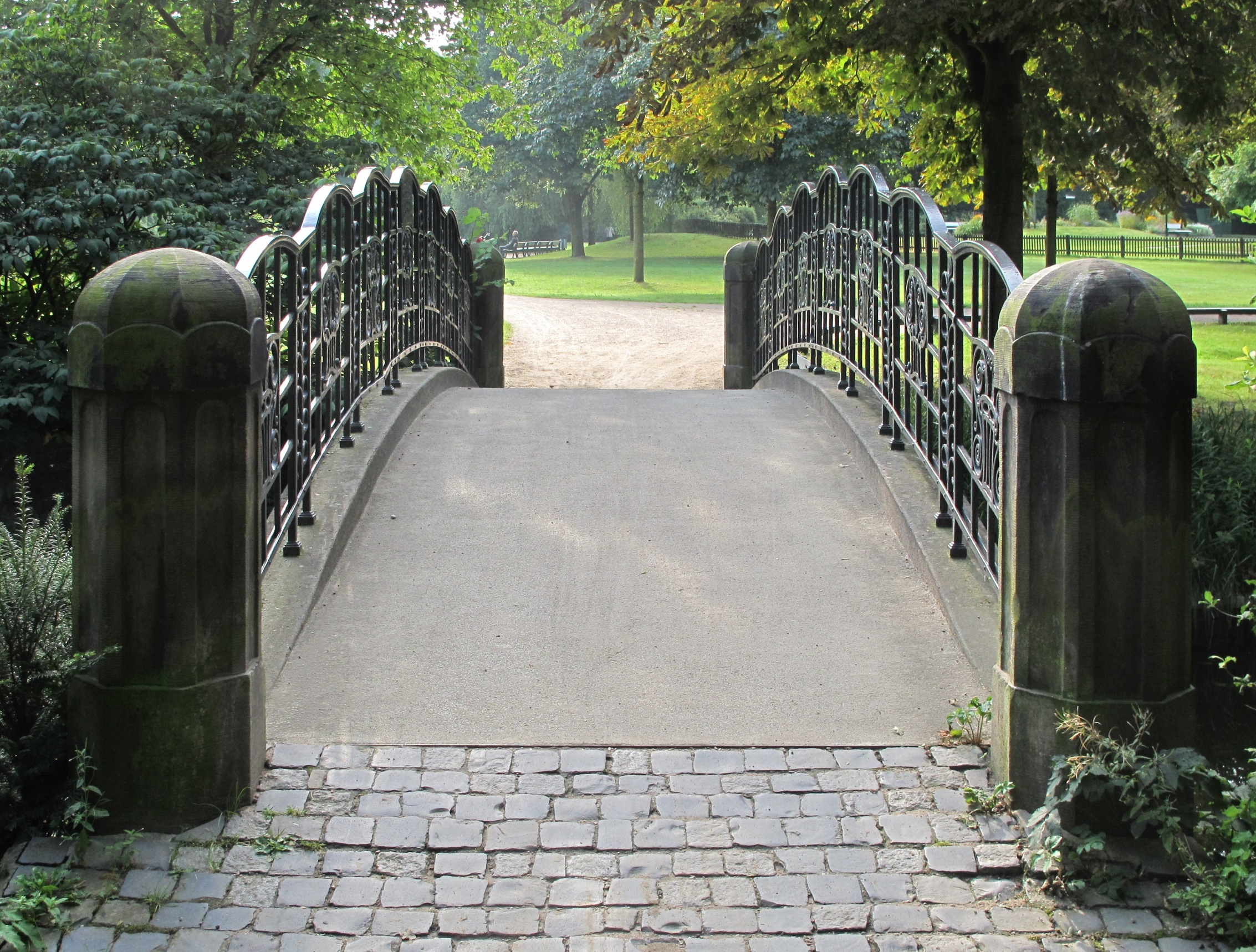 Aselmeyerbrücken in Bremen,Das abgebildete Objekt ist ein geschütztes Kulturdenkmal in der Freien Hansestadt Bremen, mit der Nr. 0218,T012 beim Landesamt für Denkmalpflege registriert.